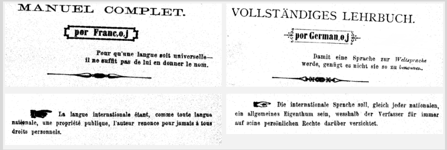 Elĉerpoj en la germana kaj en la franca elde la Unua LIbro